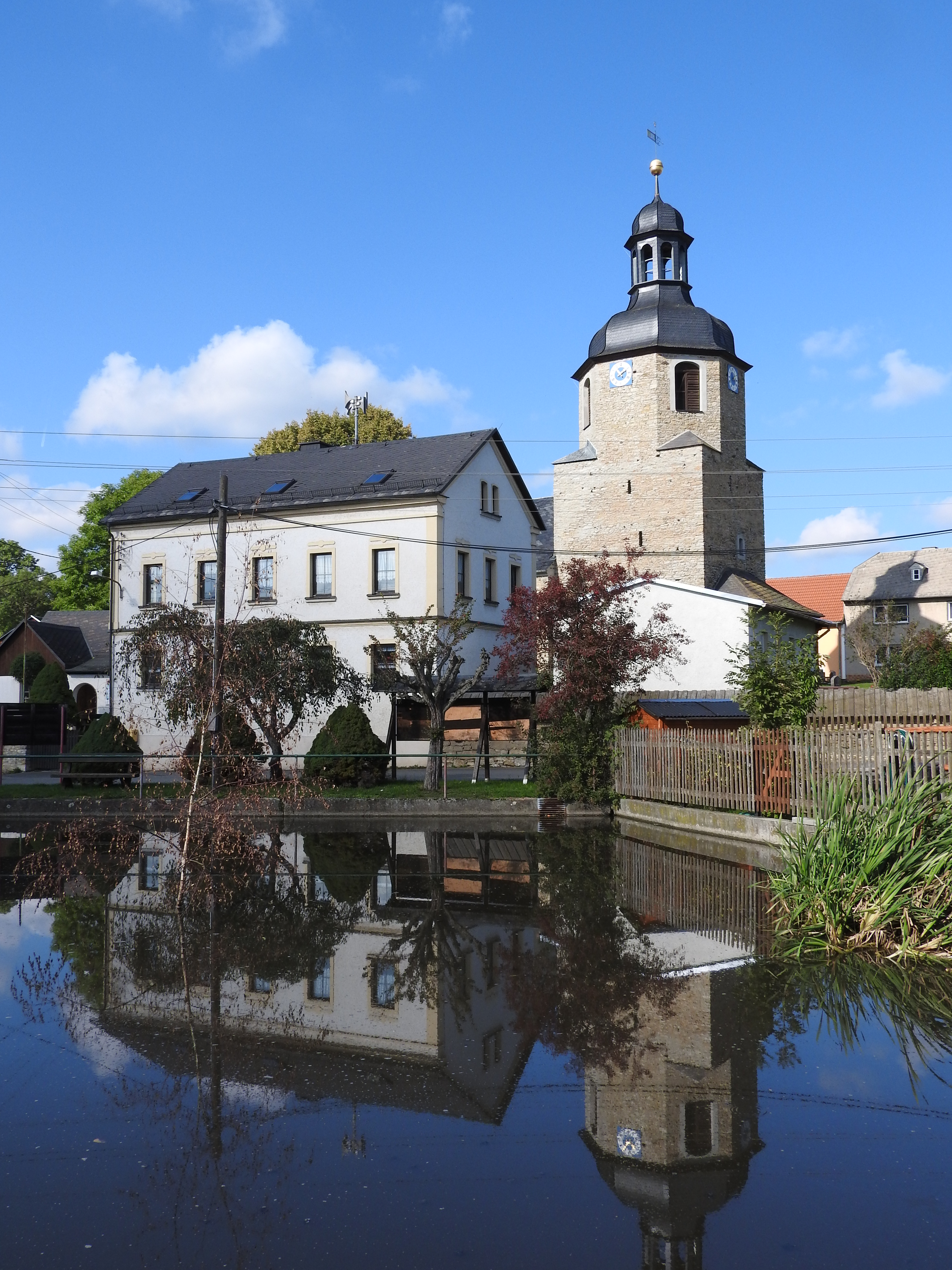 Löhma, Thüringen